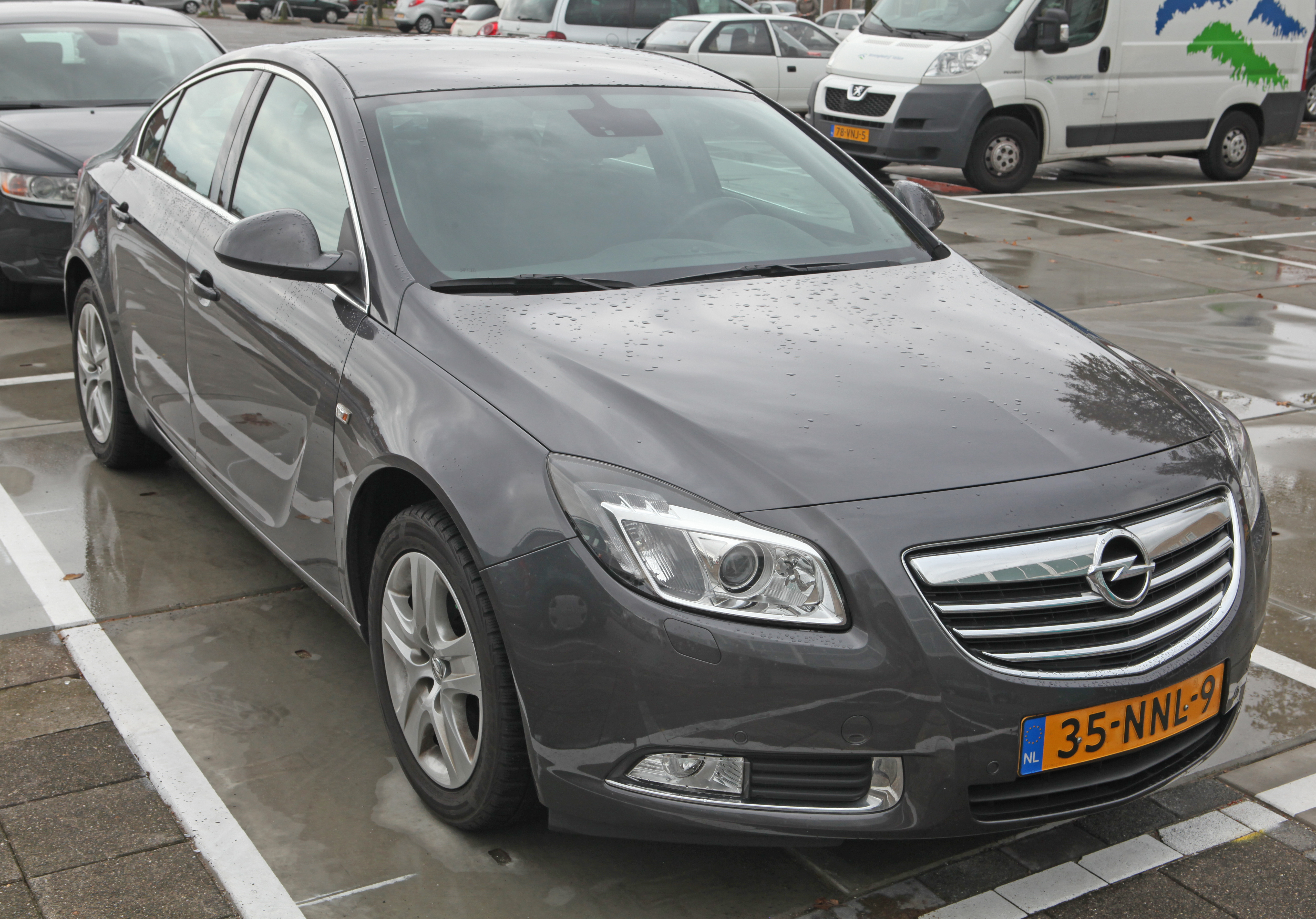 2010 Opel Insignia